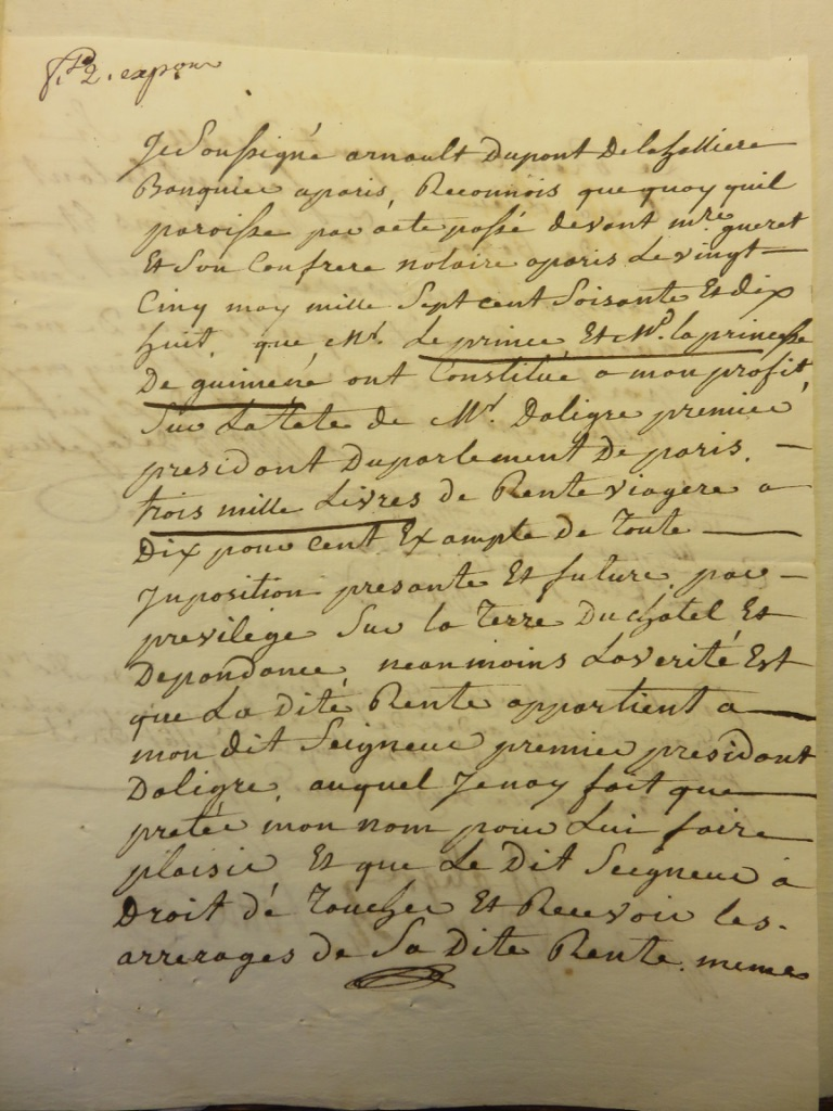 Le prince et la princesse de Guéméné constituent une rente viagère au profit d'Armand Dupont en 1778